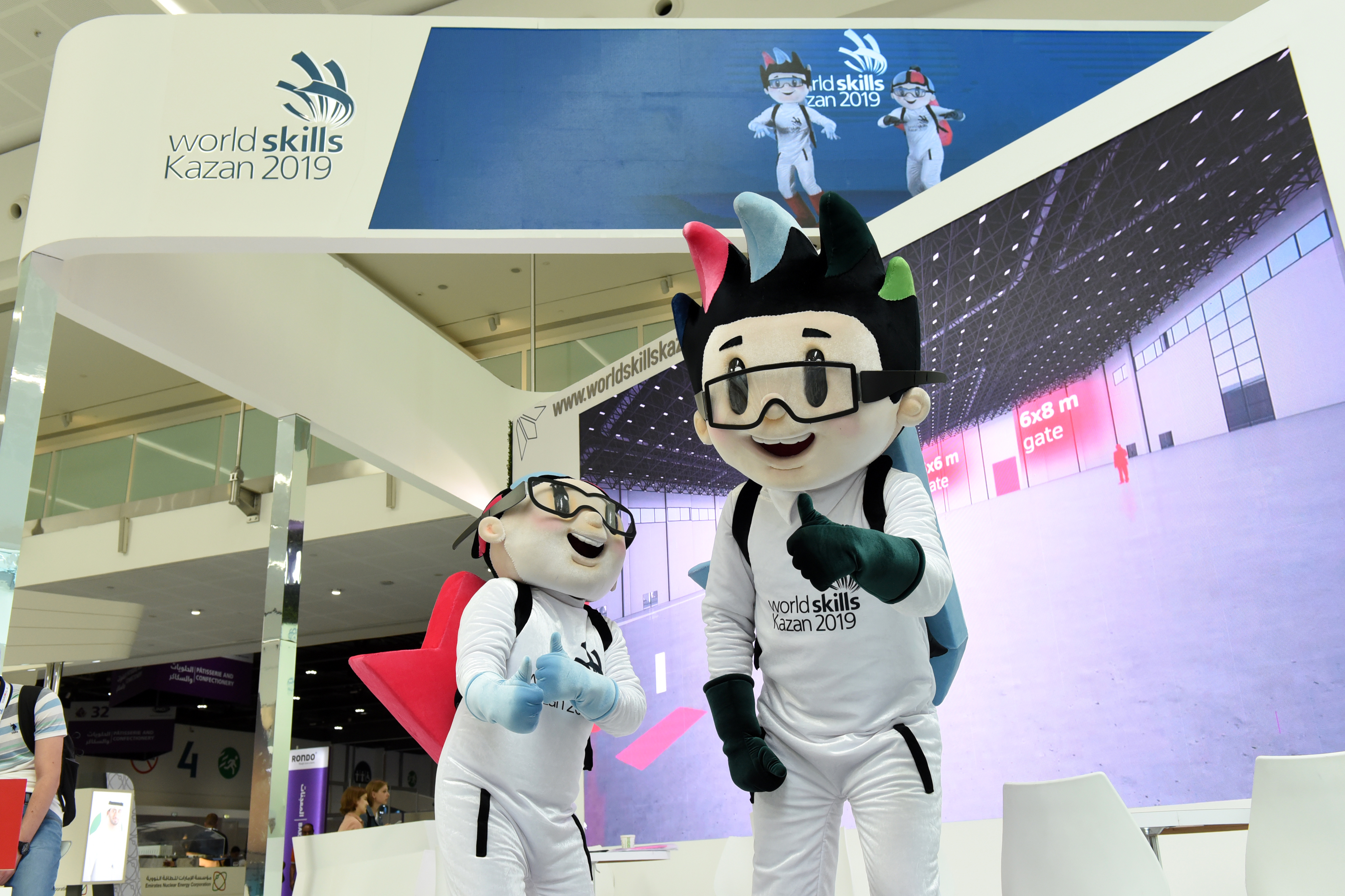 Талисманы чемпионата мира по профессиональному мастерству WorldSkills Kazan 2019 мальчик Алмаз (Almaz) и девочка Алтын (Altyn).